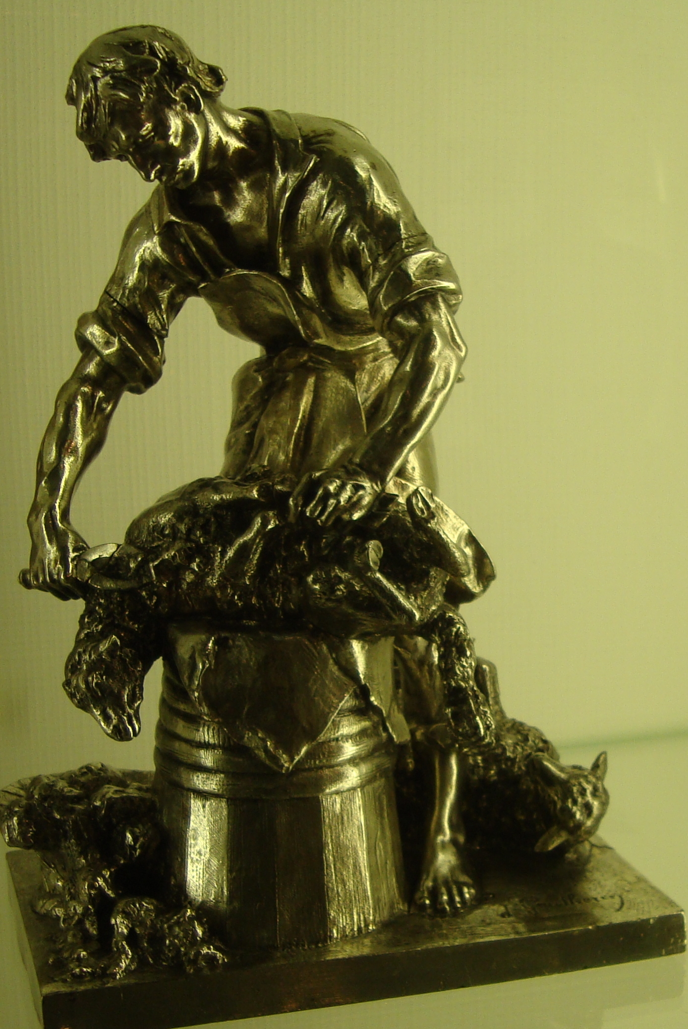 Trophée agricole Christofle de 1889 : la tonte des moutons